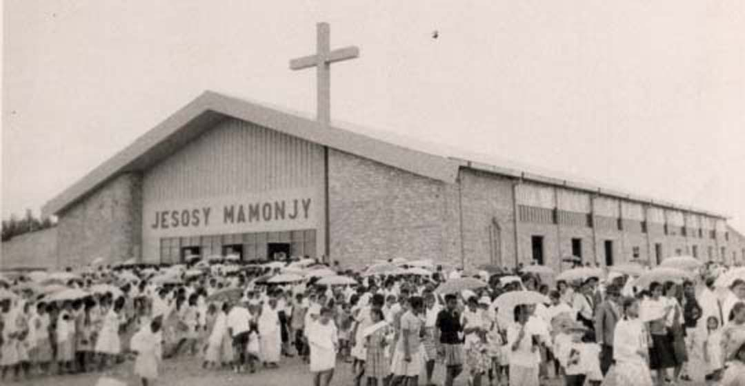 Malagasy: FiangonanaJMVoalohany1964